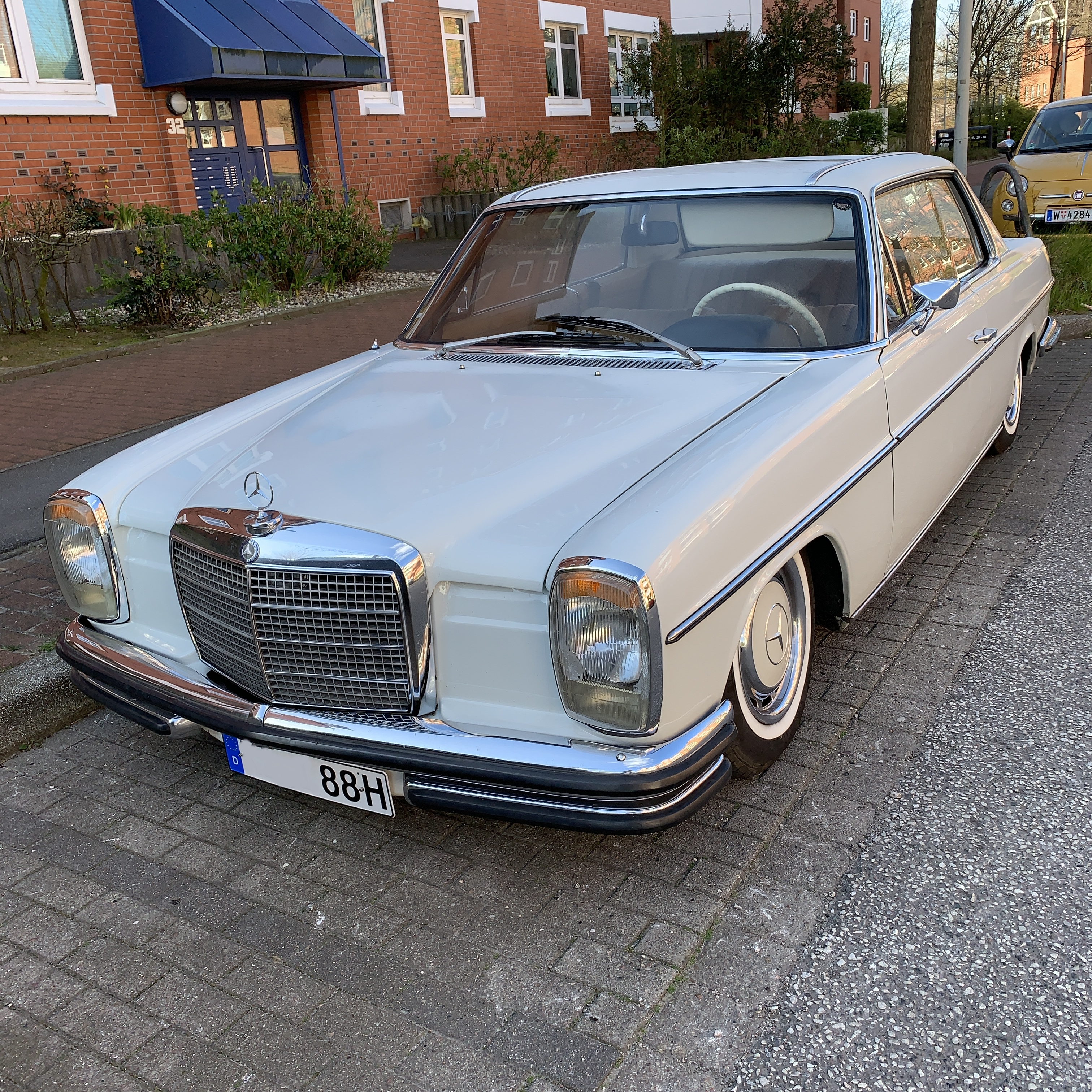 Mercedes-Benz W114 250C